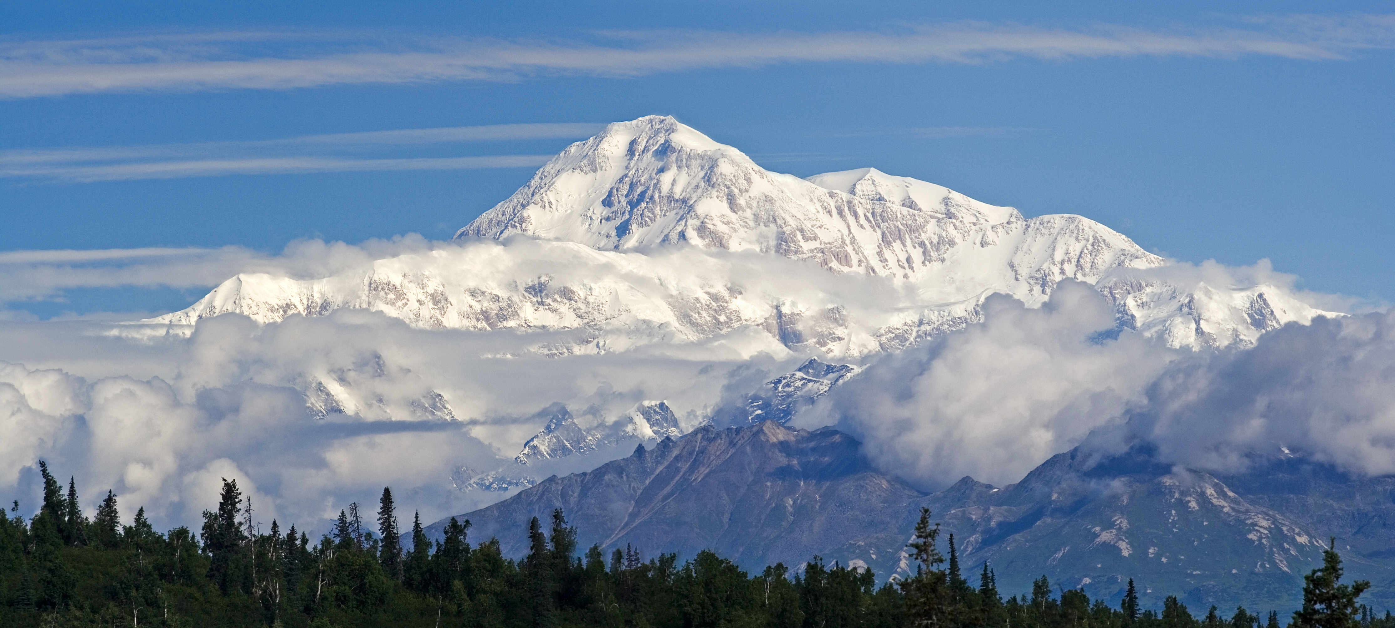 Blick auf den Denali (Mt. McKinley) im Denali National Park, Alaska von der McKinley Princess Wilderness Lodge (nahe Talkeetna) aus gesehen.